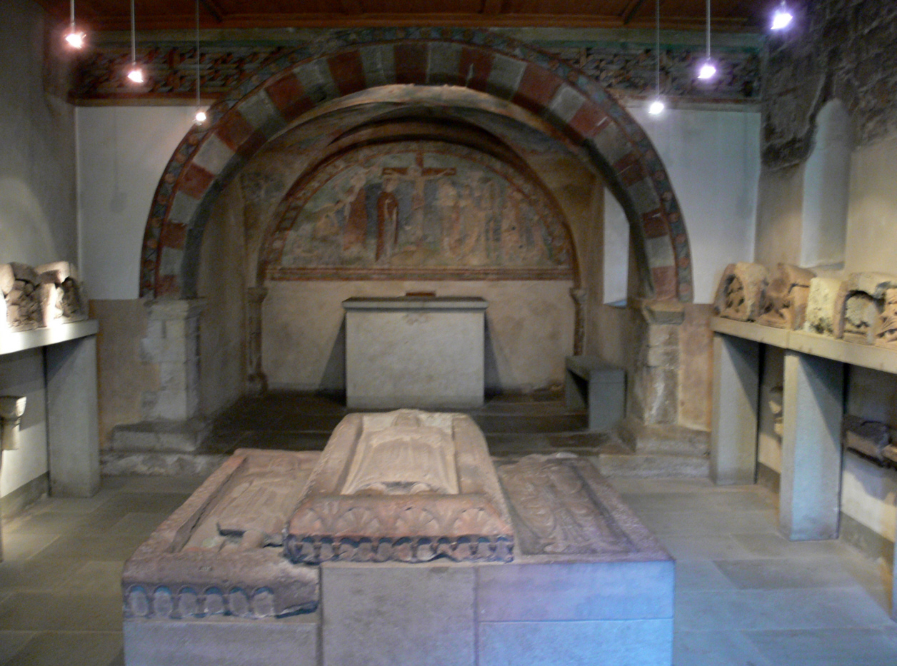 Schaffhausen, Museum zu Allerheiligen Erhardskapelle (im Vordergrund die Originalreliefs der Grablege der Nellenburger)